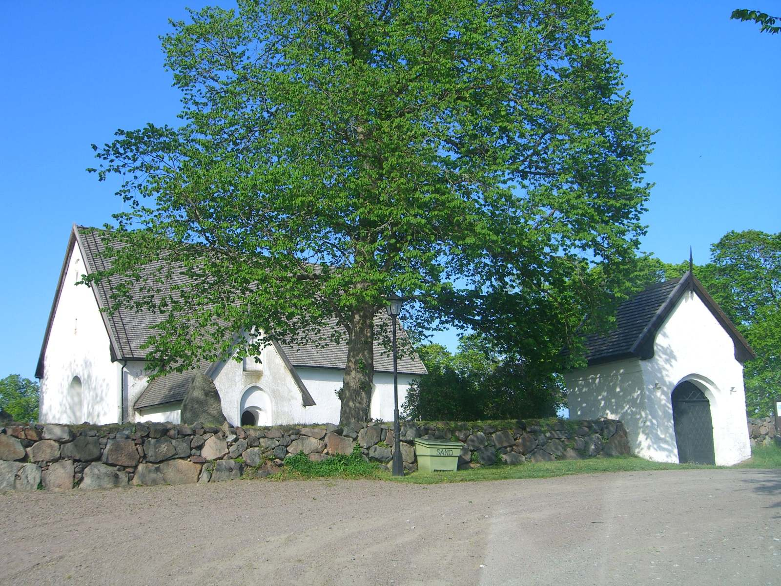 Östuna kyrka